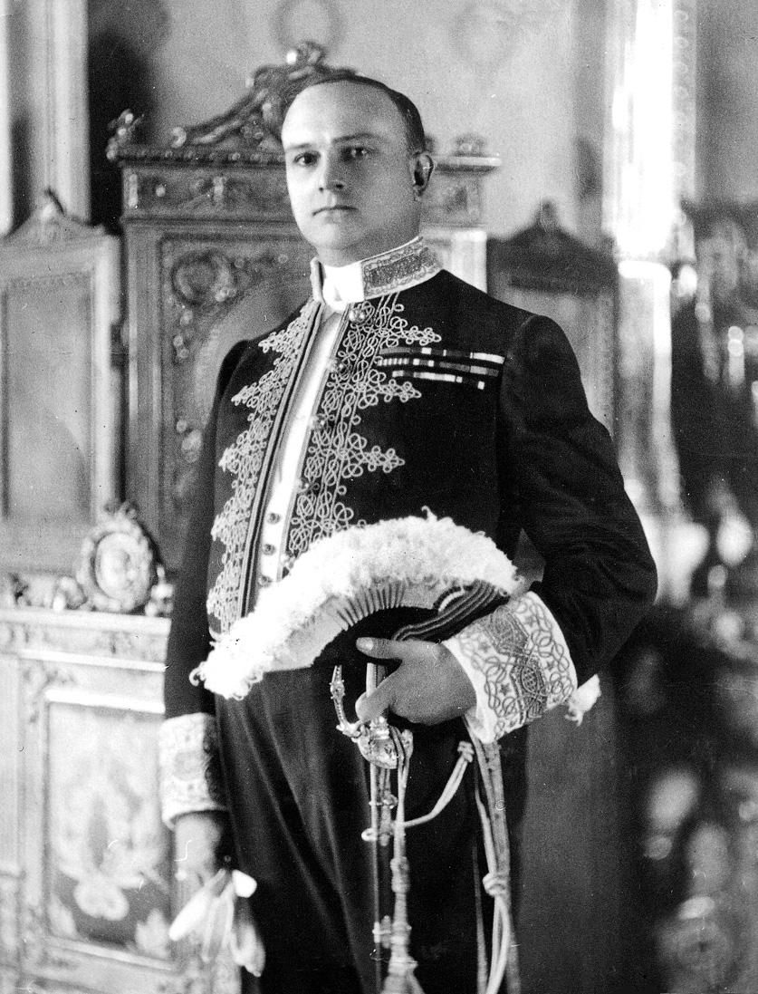 Il dott. Guido Corni, figlio di Fermo Corni, deputato al Parlamento e, per alcuni anni, governatore della Somalia, allora colonia italiana. Fu presidente del CdA della Scuola Corni alla morte del padre.